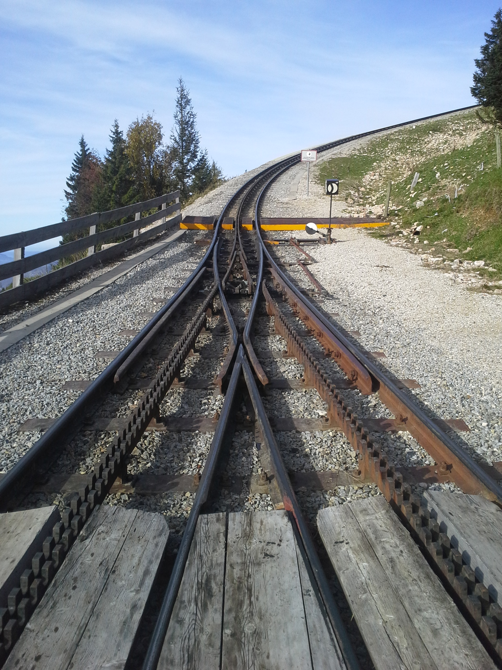 Weiche einer Zahnradbahn nach System Abt. Station Schafbergalm, Schafbergbahn, Salzkammergut, Österreich, 19.10.2013